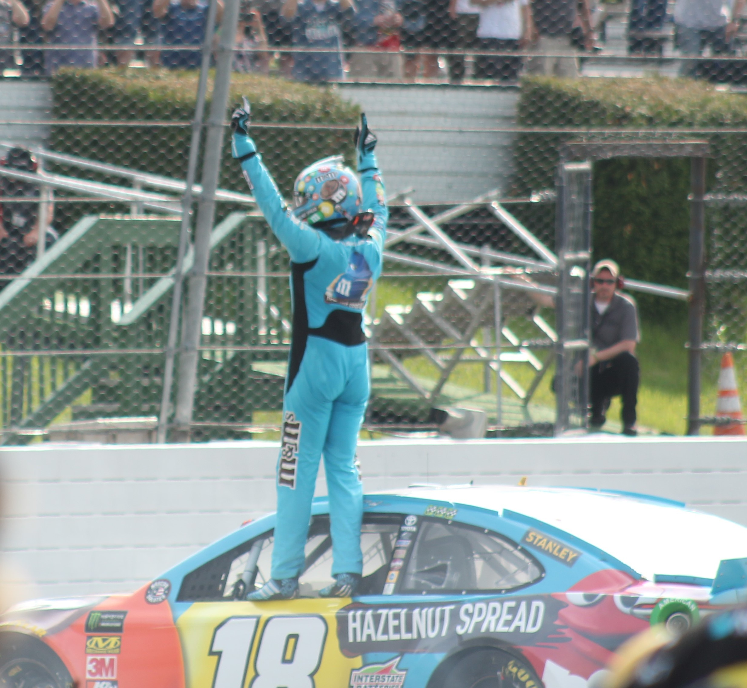 2019 Pocono 400